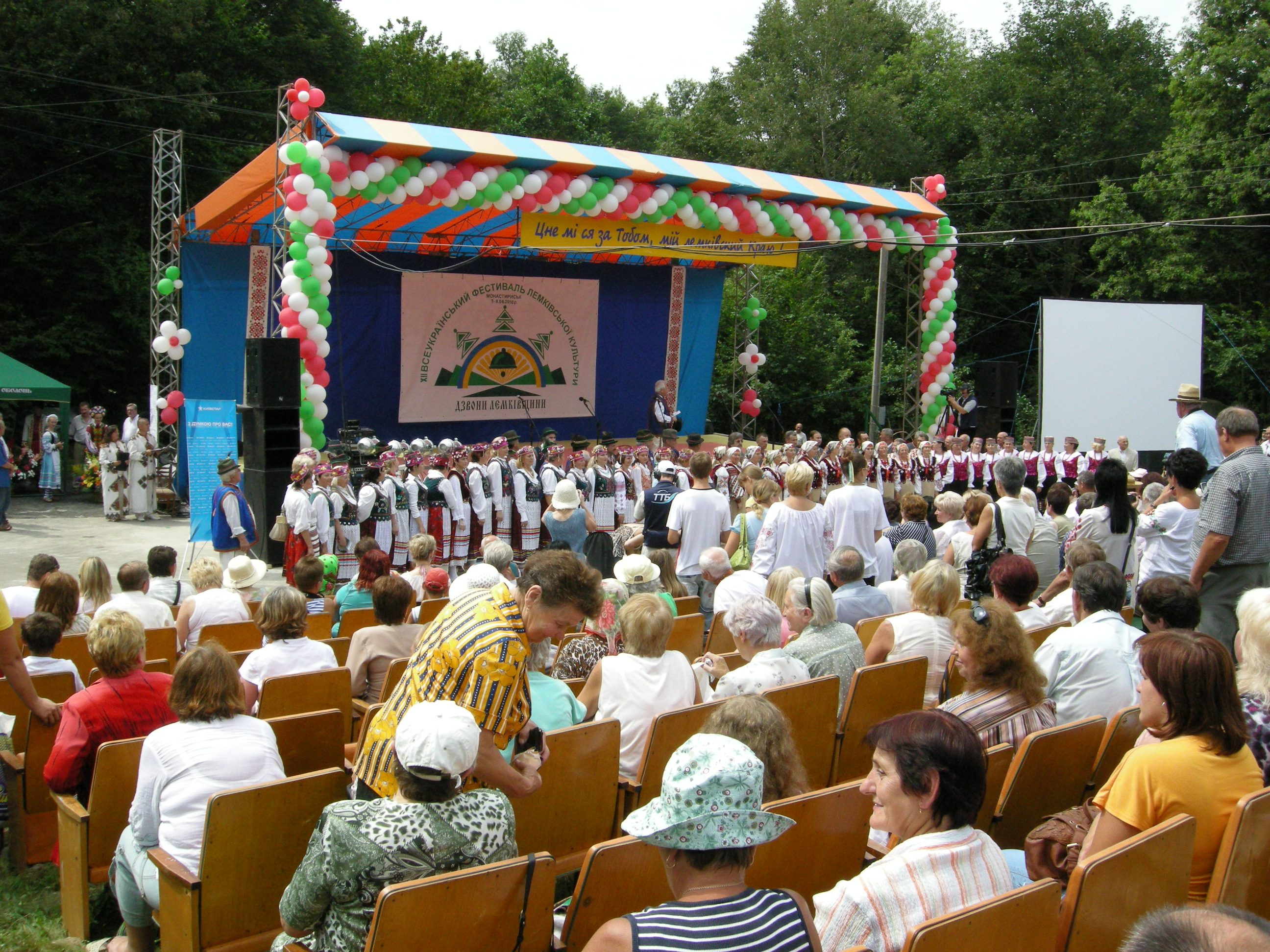 XII Всеукраїнський традиційний фестиваль лем­ківської культури «Дзвони Лемківщини», який відбувся 7-8 серпня 2010 року в урочищі Бичова біля Монастириськ Тернопільської області. Концерт.